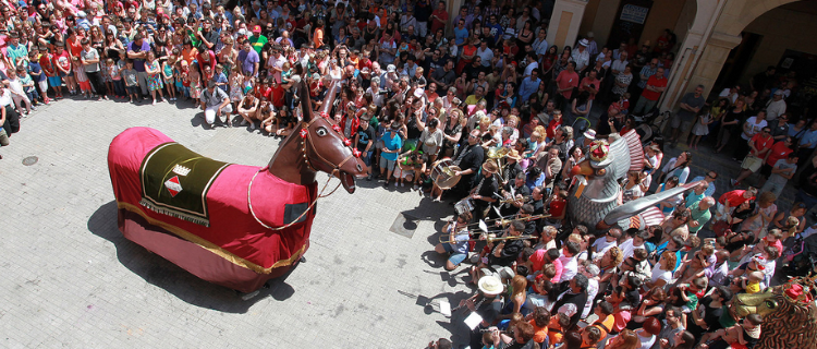 La Mulassa de Valls ballant a la plaça del Blat